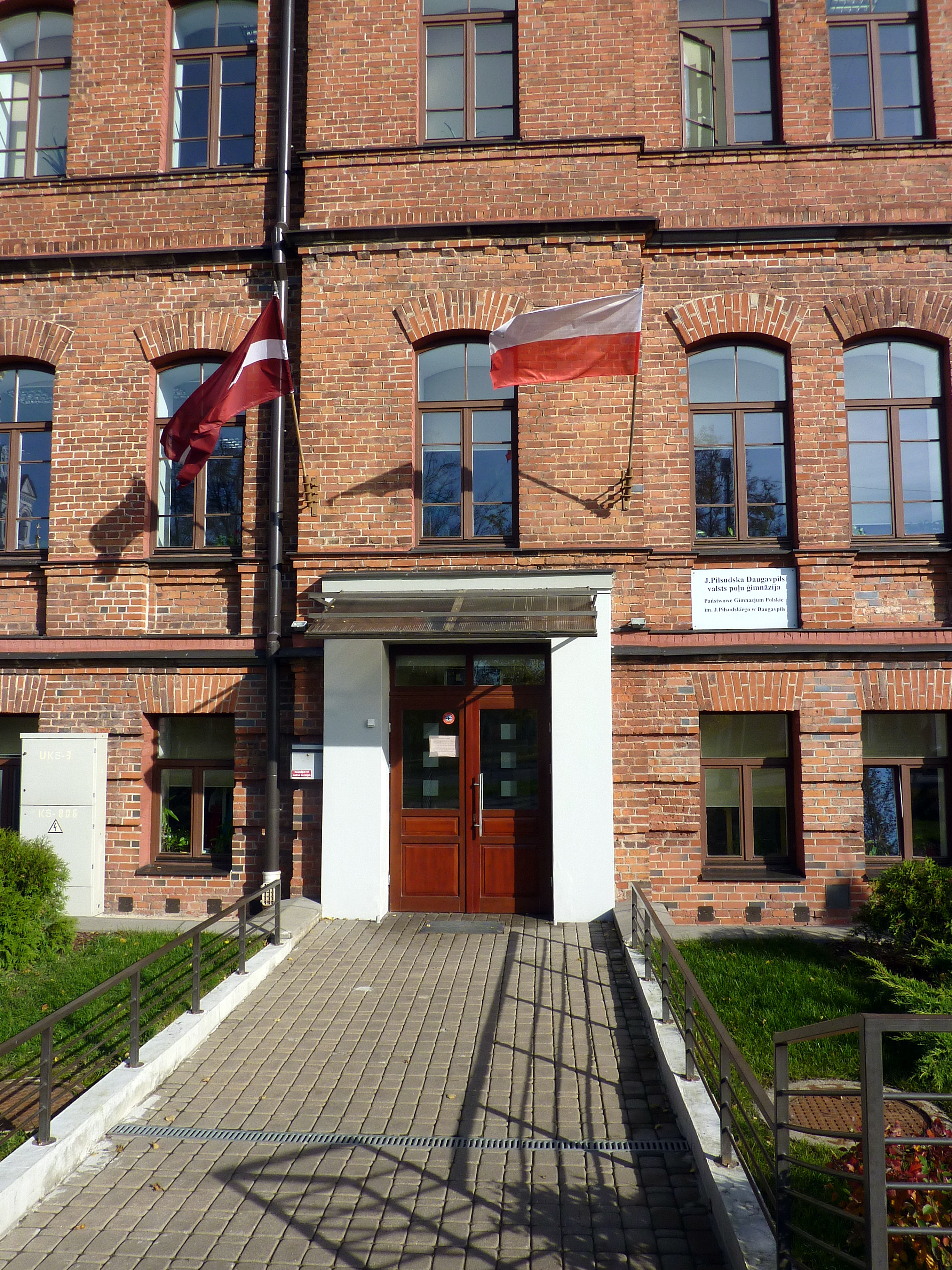 Gimnazjum Polskie im. J. Piłsudskiego w Daugavpils